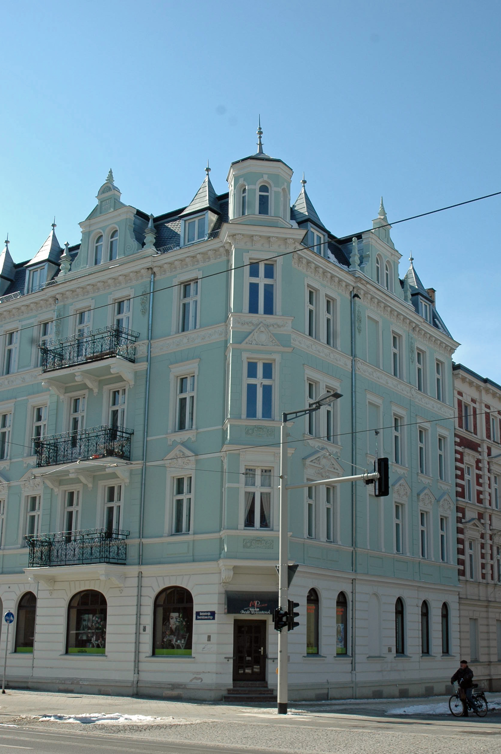 Bahnhofstraße 68